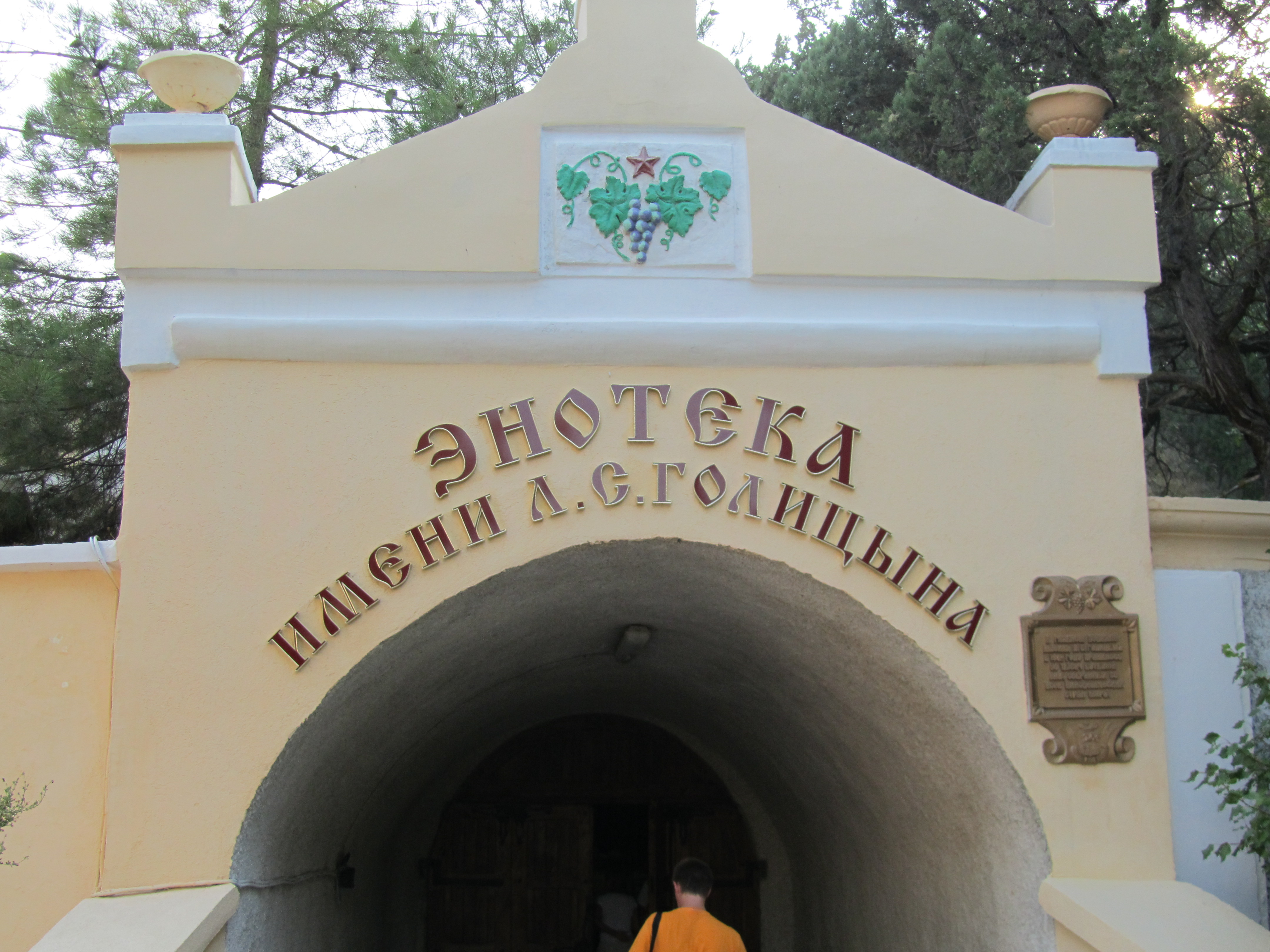 Вход в энотеку (Enoteca). Новый Свет. Крым. Август 2010